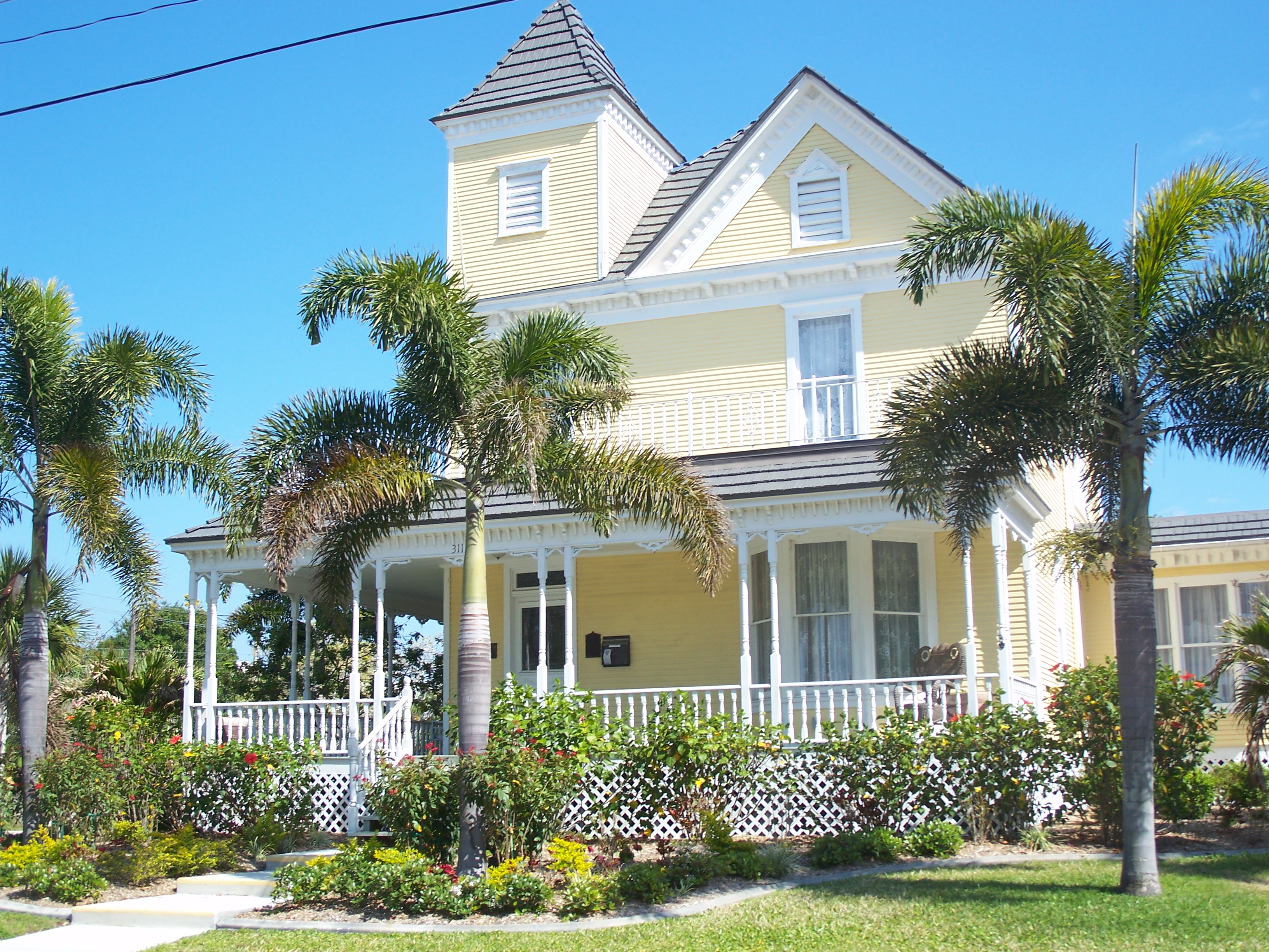 Punta Gorda, Florida: A. C. Freeman House